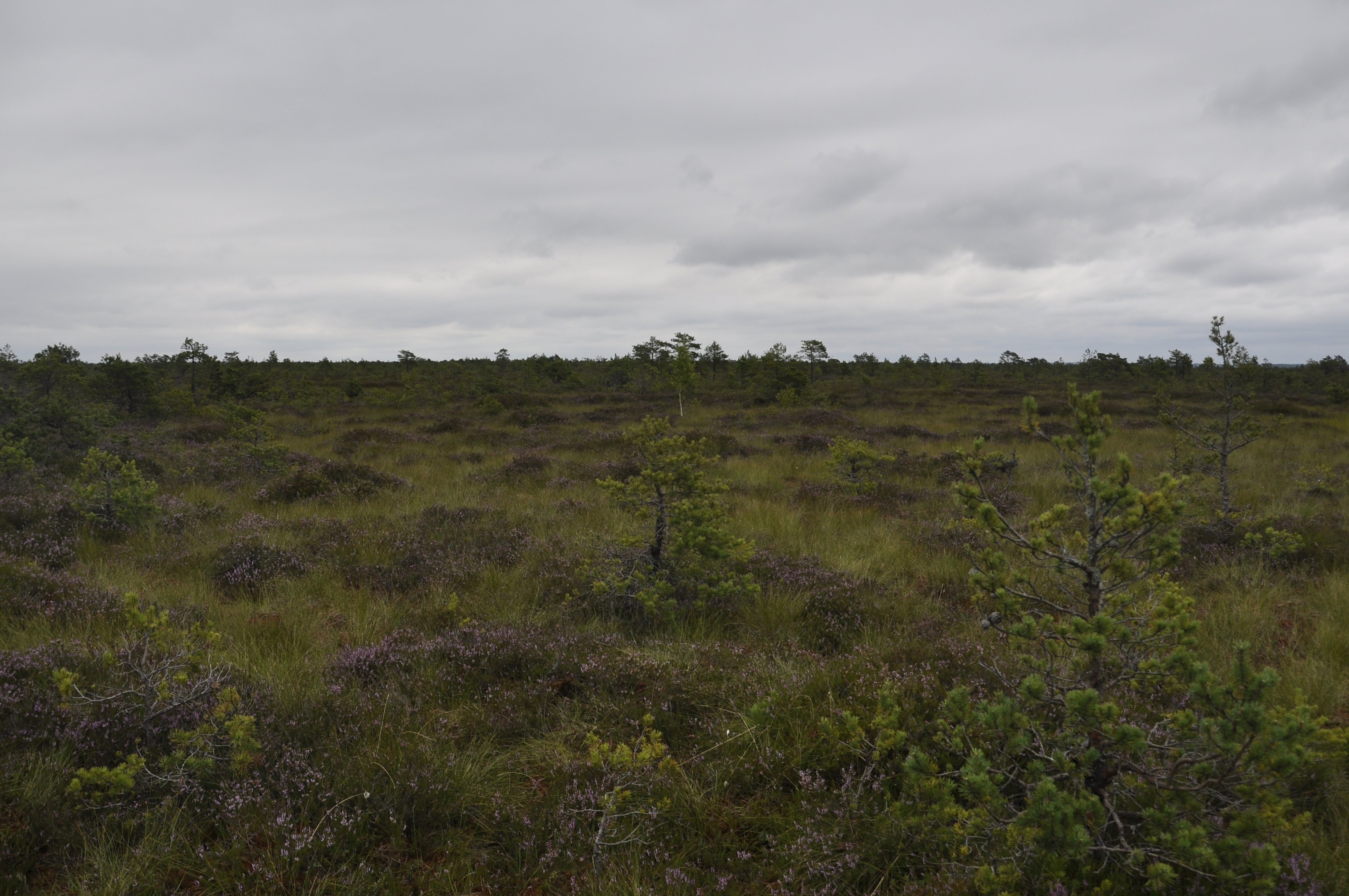 Tuhu soostiku raba